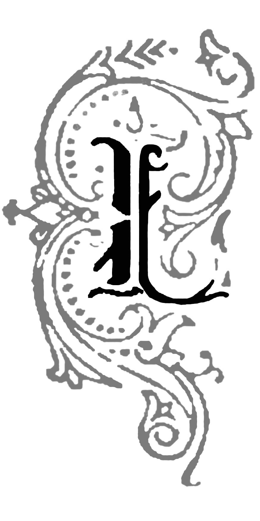 Inicjał w książce wydanej w 1904 r. w Warszawie